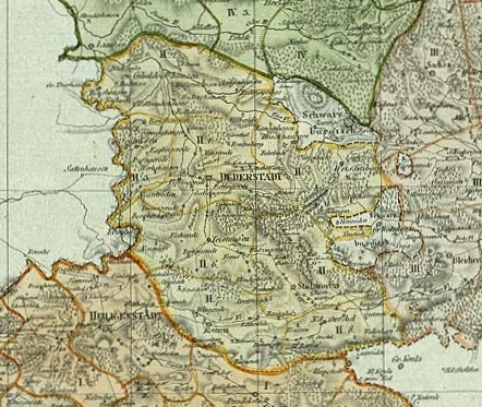 Charte von dem Departement des Harzes des Königreichs Westphalen: Ausschnitt Distrikt Duderstadt